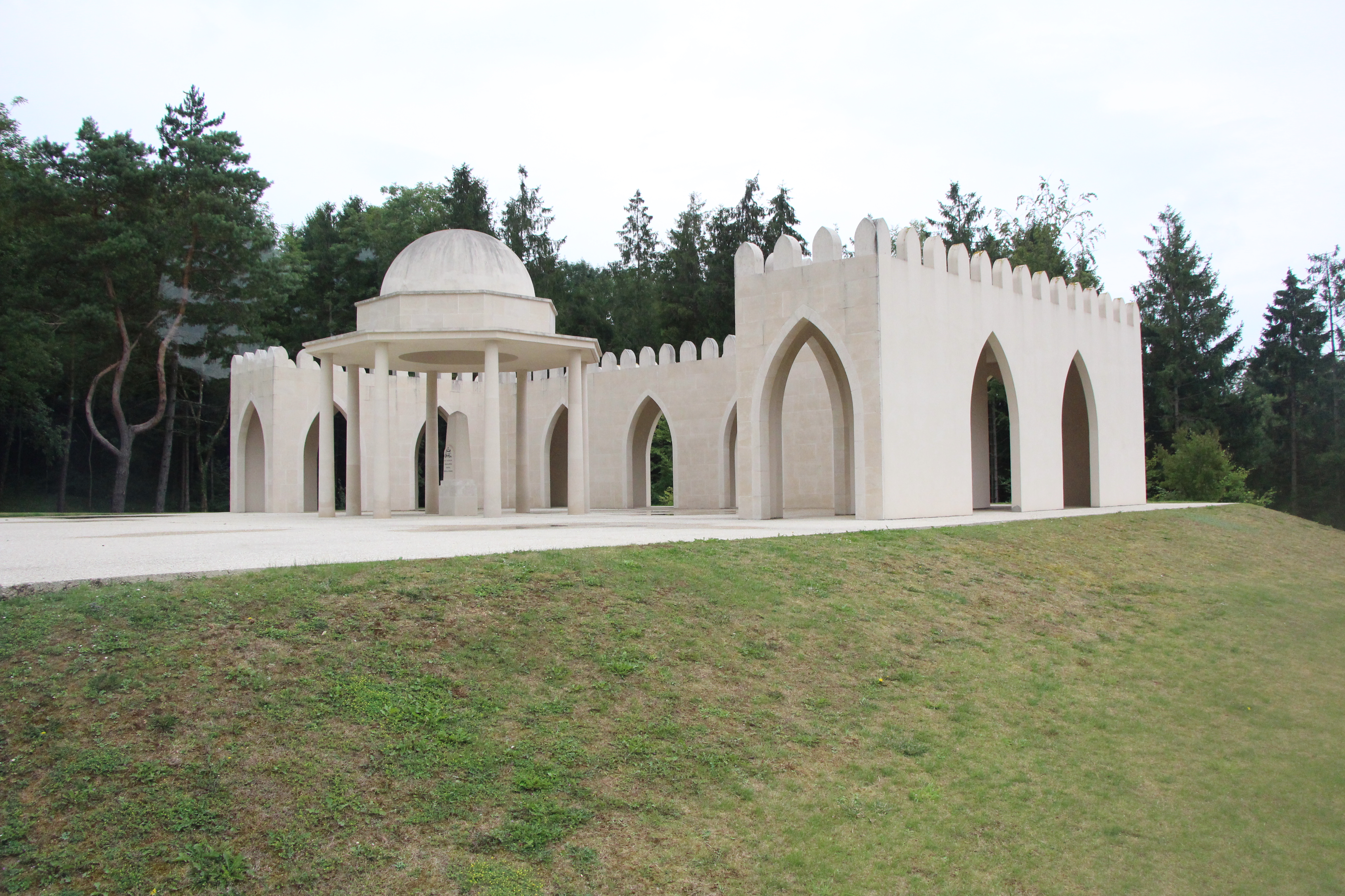 Verdun.